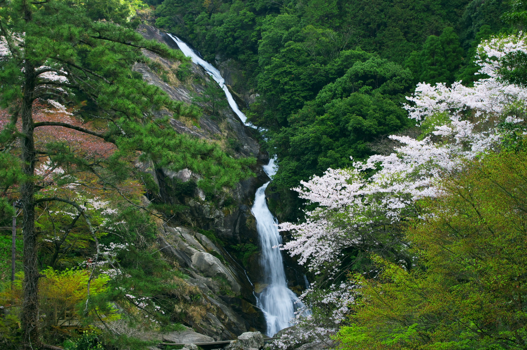 見帰りの滝